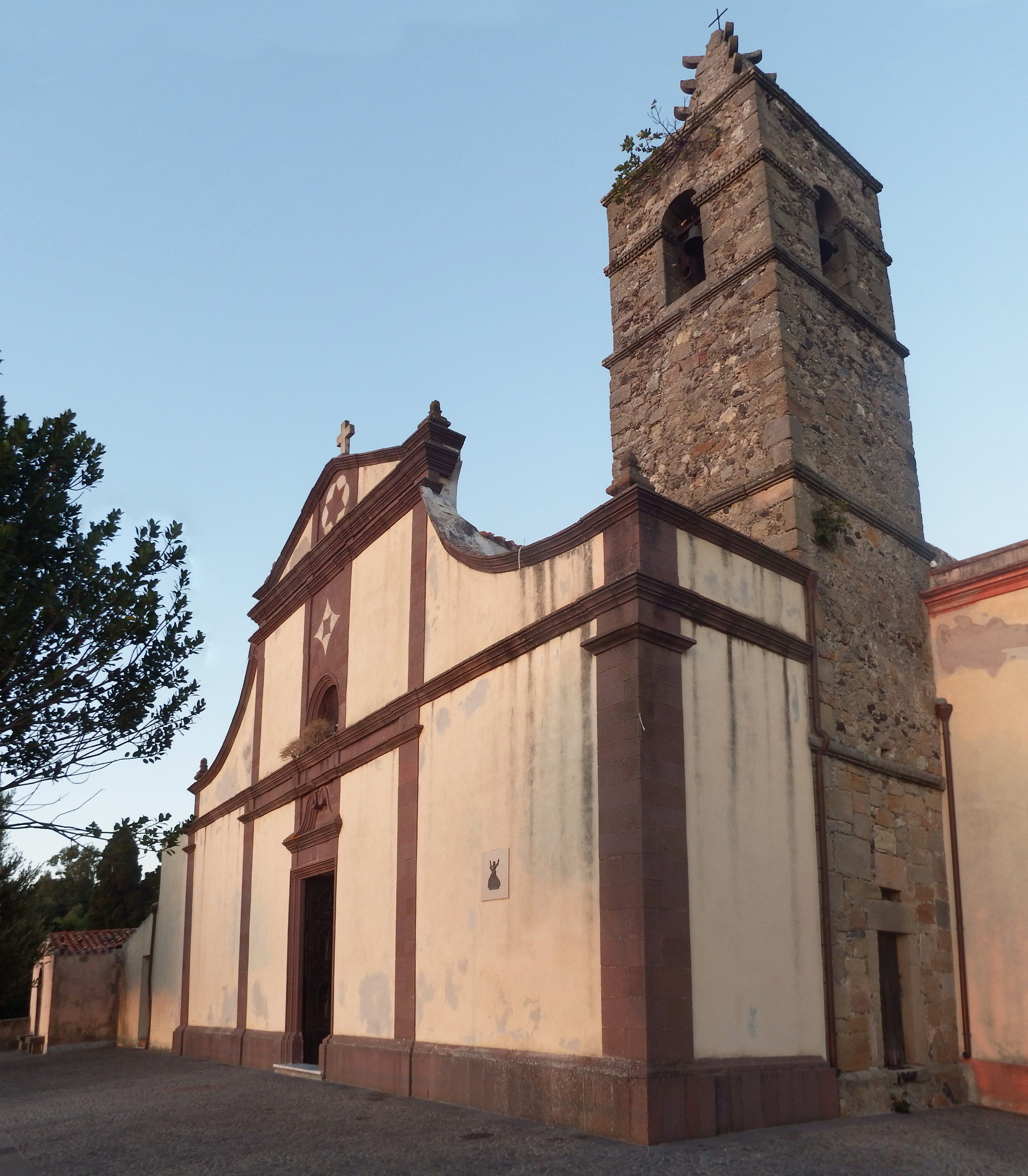 Facciata e campanile della "chiesa grande" di Scano Montiferro